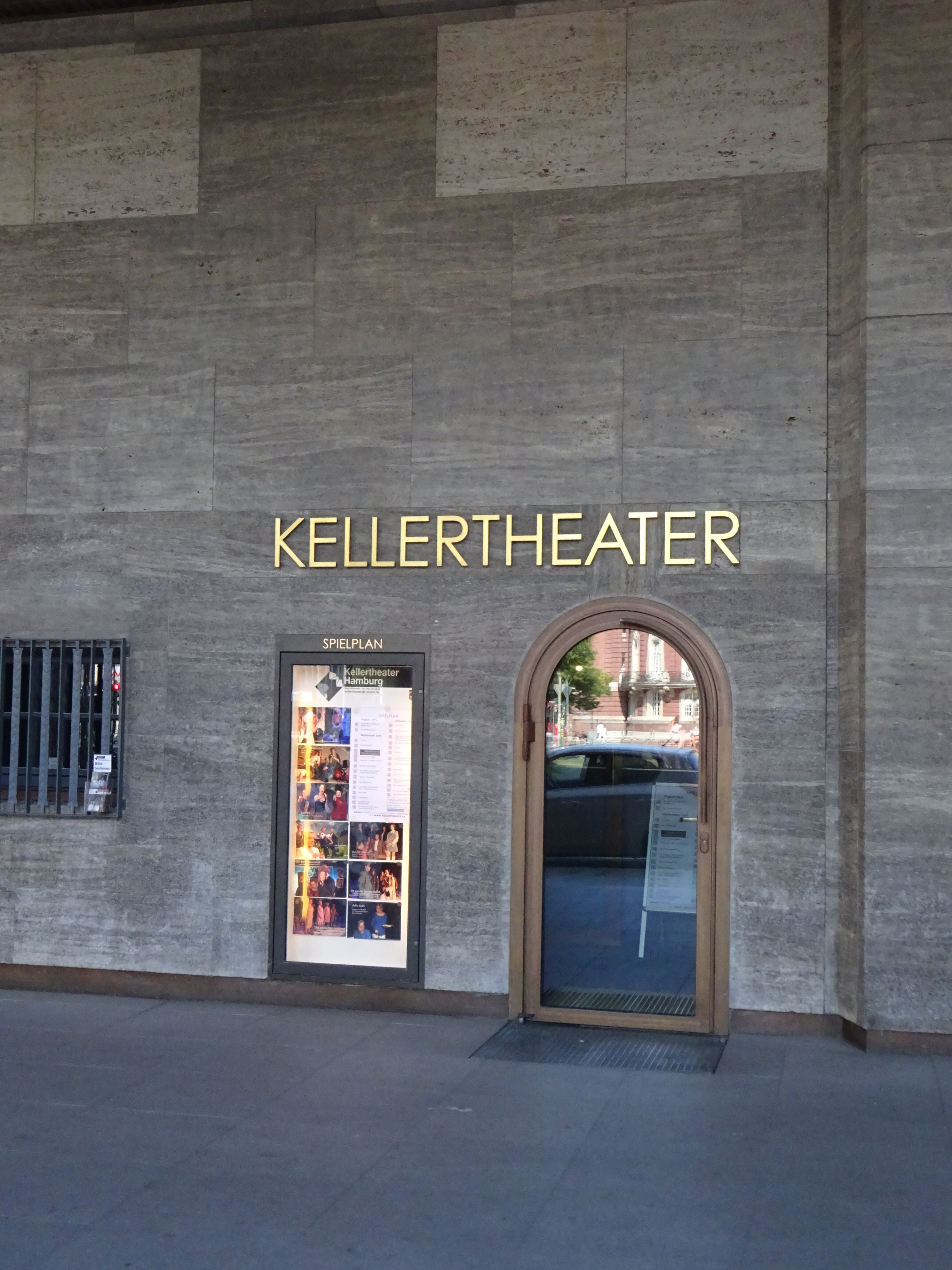 Kellertheater im Brahms Kontor in Hamburg-Neustadt This is a photograph of an architectural monument.